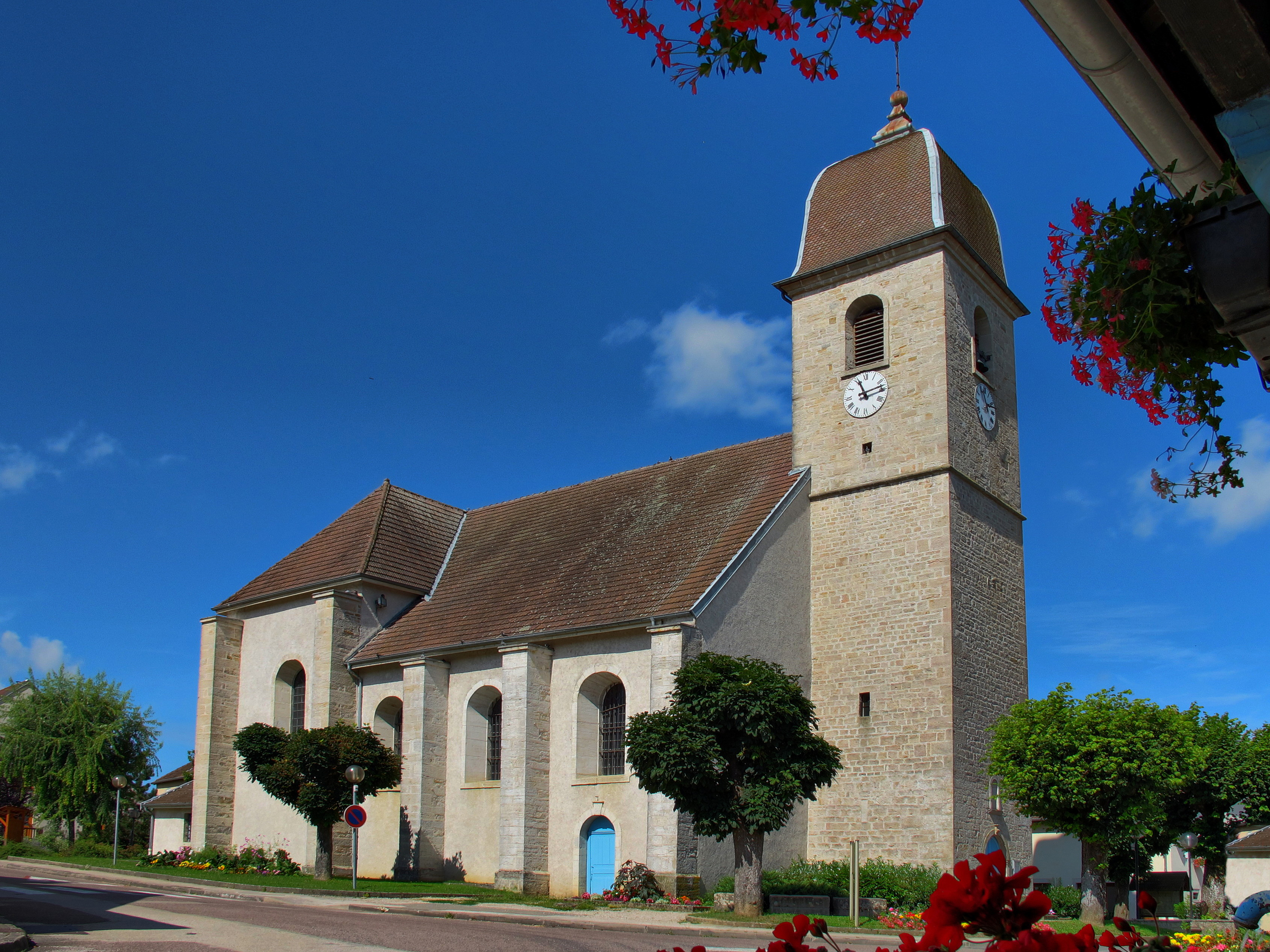 L'église Saint-Aubin